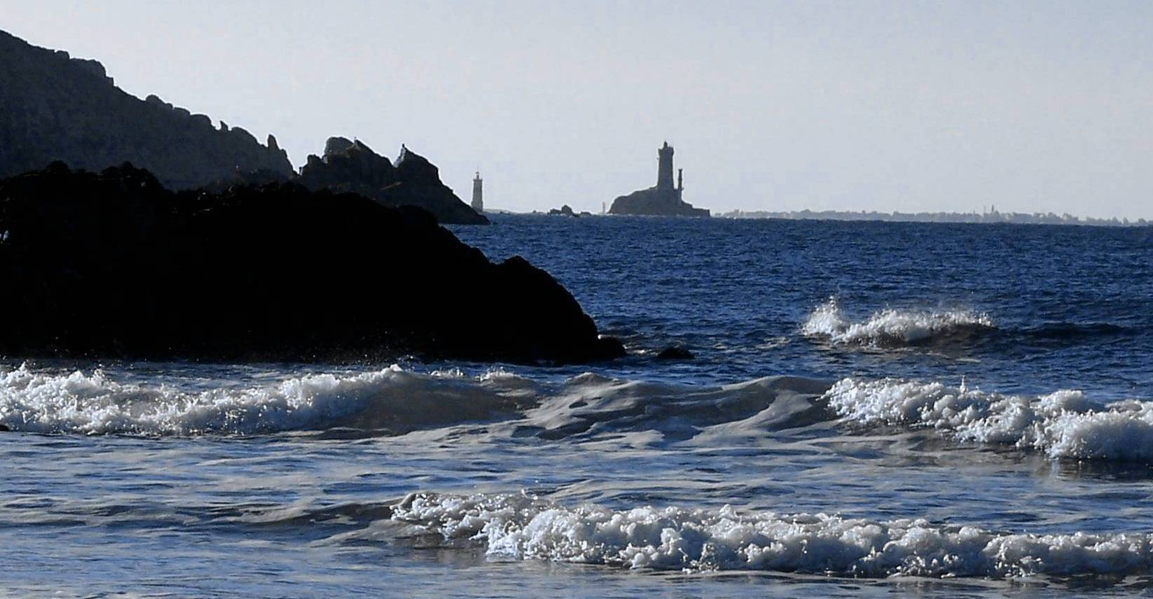 la pointe du Raz vue de la baie des Trépassés (en arrière-plan l'Île de Sein)